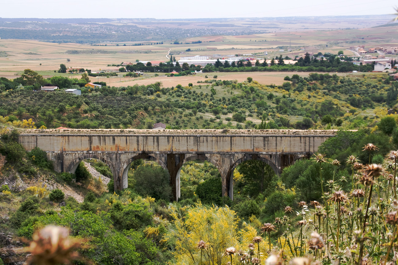 Acueducto de Matachivos, en el canal de El Atazar. Detrás casas de las afueras de Torrelaguna y al fondo la urbanización de Caraquiz.